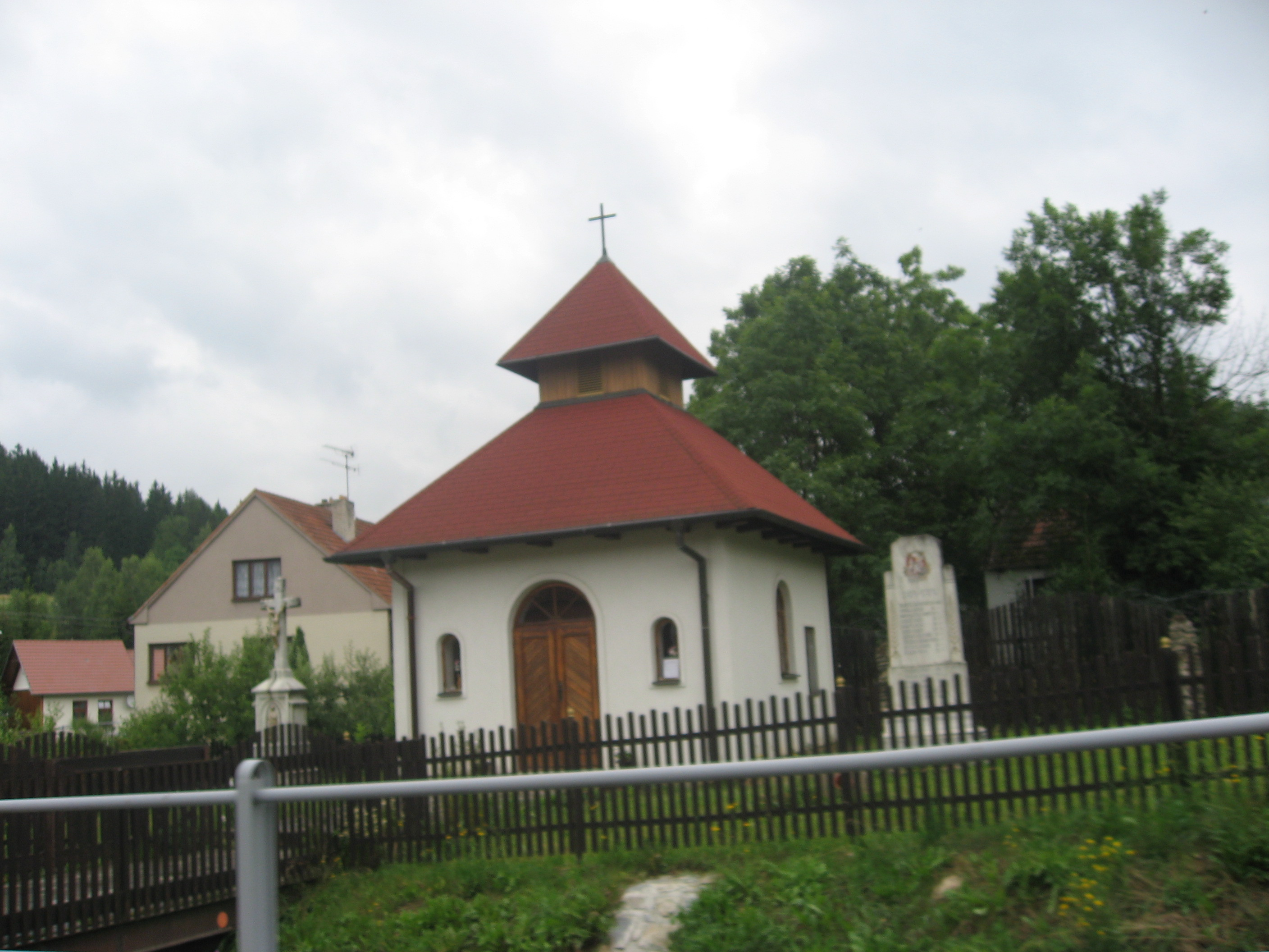 Hodonín, okres Blansko